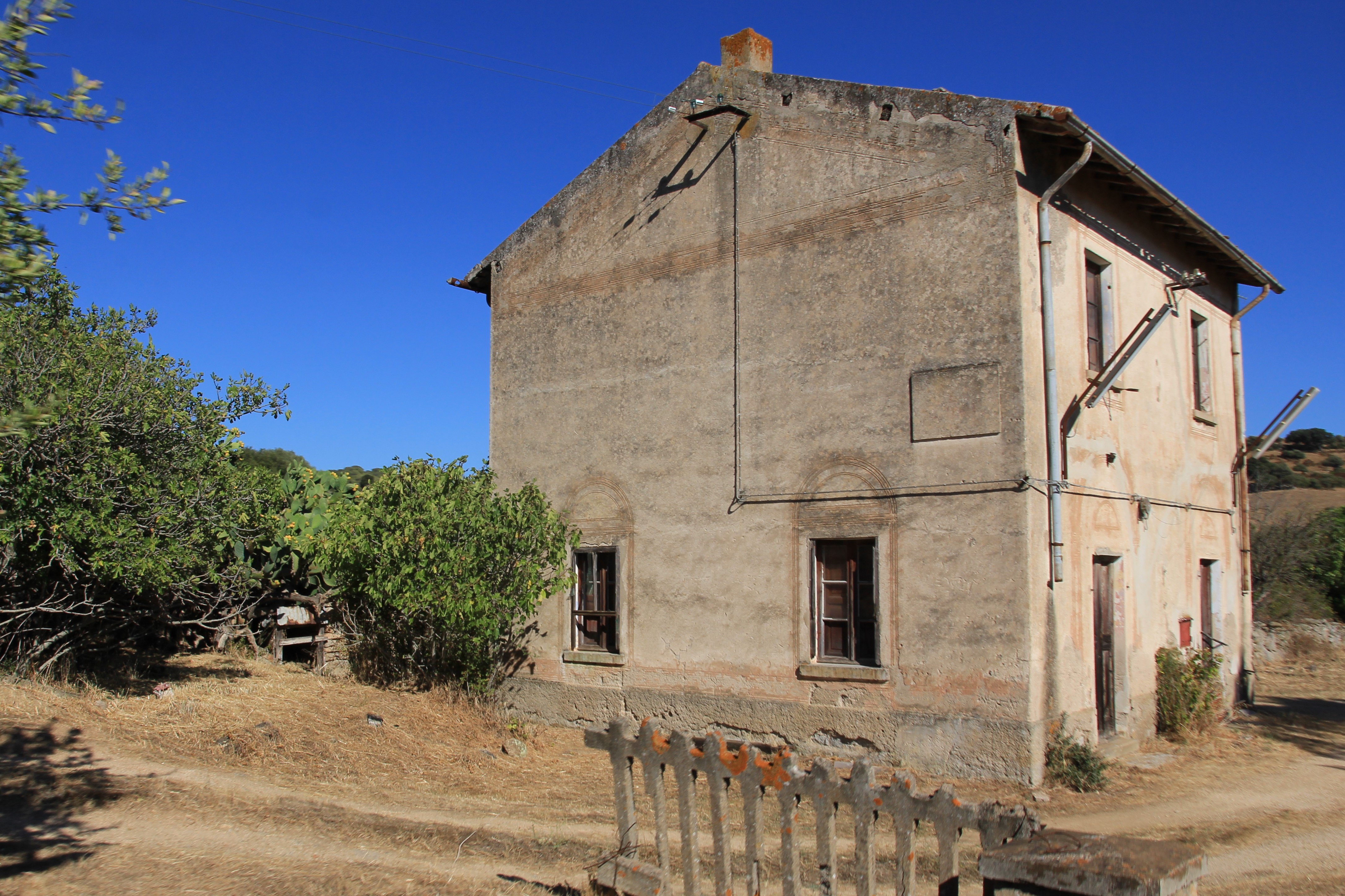 Sant'Antonio di Gallura, stazione ferroviaria di Rio Piatto